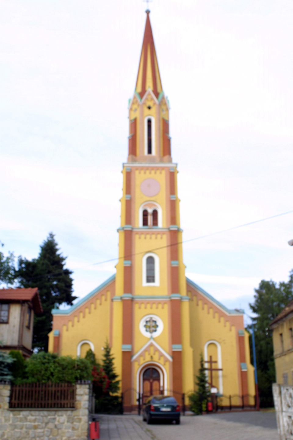 Przemków. Cerkiew św. Michała Archanioła, pierwotnie ewangelicki kościół z poł. XVIII w.